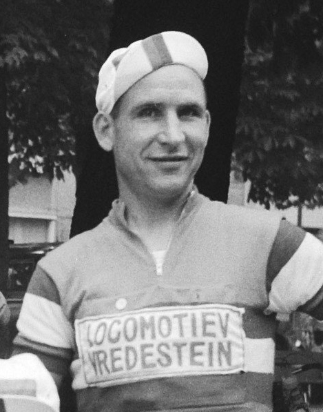 Nationaal Archief Beschrijving: De Nederlandse ploeg, Tour de France 1960 Wim van Est Datum: 28 juni 1960 Bestanddeelnummer 911-3748 Vervaardiger: Anefo / Harry Pot (1929–1996) DescriptionDutch photographer and cinematographerDate of birth/death 1929 1996Work location Amsterdam, BentveldAuthority control : Q27877051 VIAF: 284191334 ISNI: 0000 0003 9050 874X Koninklijke: 073478326 creator QS:P170,Q27877051 URL: [1] Voor meer informatie over het Nationaal Archief: Voor meer foto's uit deze en andere collecties, bezoek onze Beeldbank:, U kunt ons helpen onze kennis van de fotocollecties te verrijken door tags en commentaren toe te voegen. Herkent u mensen of locaties of heeft u een bijzonder verhaal te vertellen bij één van de foto's, laat dan een reactie achter (als u ingelogd bent bij Flickr) of stuur een mailtje naar